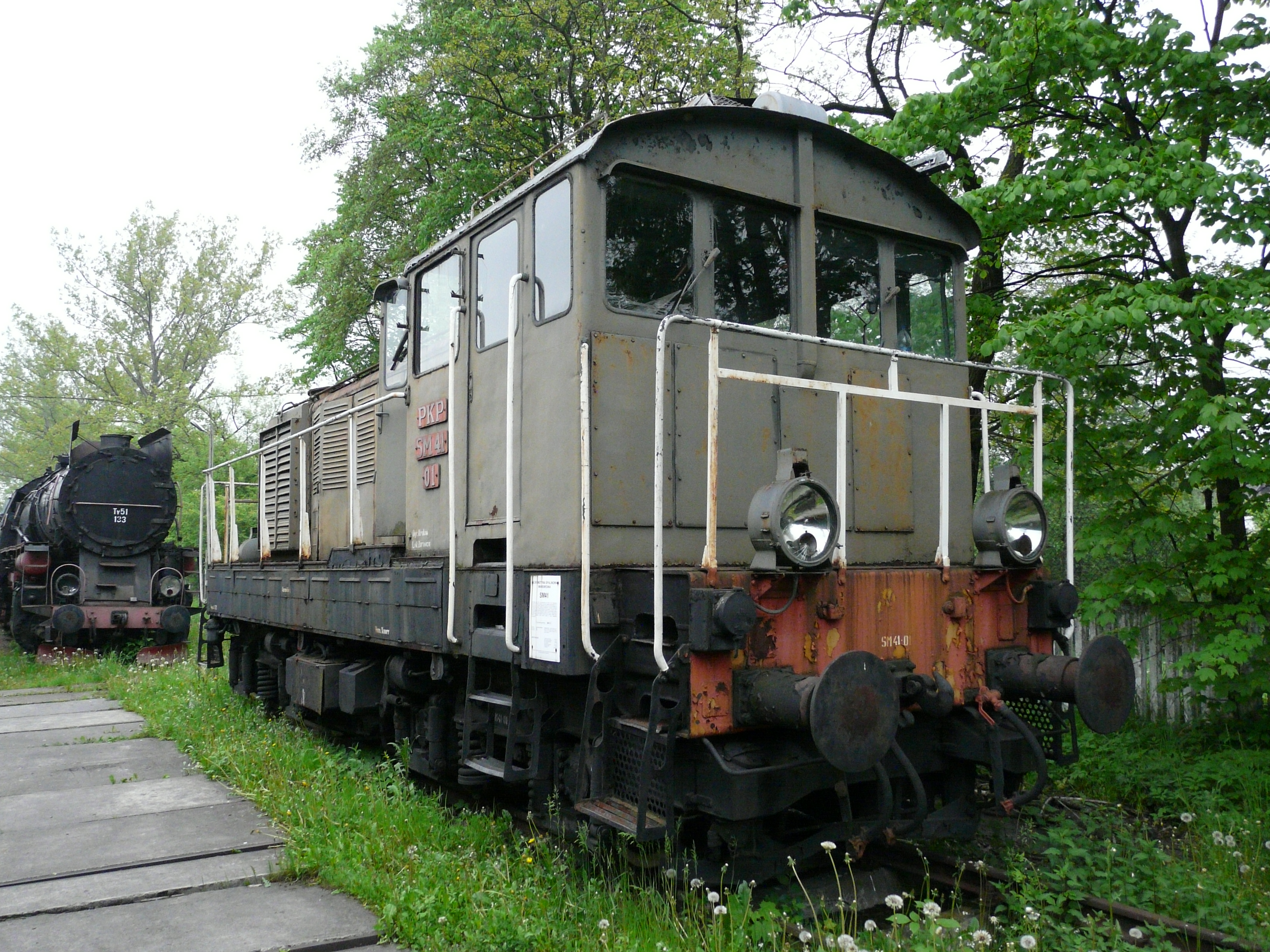 Spalinowa lokomotywa manewrowa SM41-01. Eksponat skansenu taboru kolejowego w Chabówce